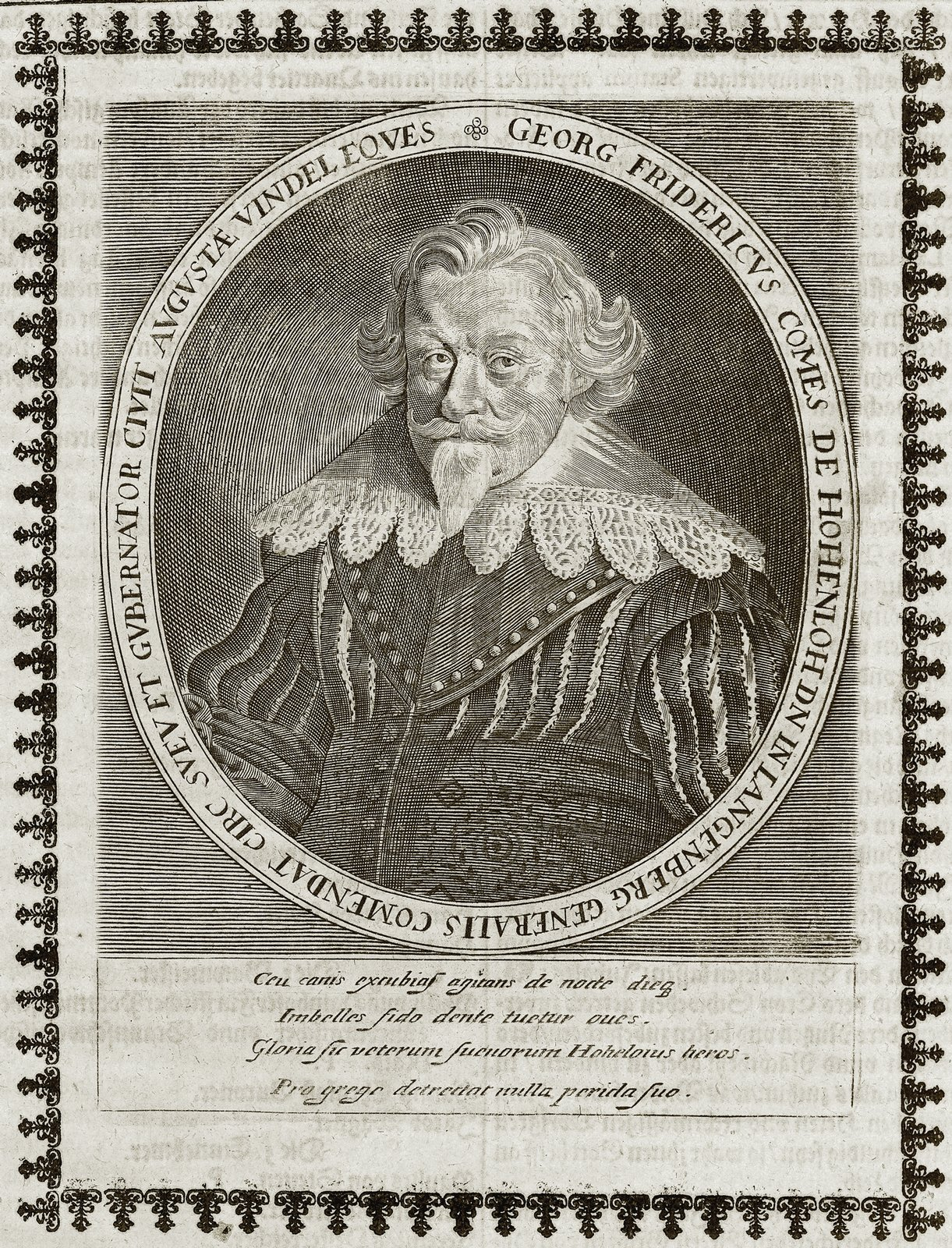 Georg Friedrich von Hohenlohe-Neuenstein-Weikersheim (1569–1645). Original text: GEORG FRIDERICVS COMES DE HOHENLOH DN IN LANGENBERG GENERALIS COMENDAT CIRC SVEVET GVBERNATOR CIVIT AUGUSTAE VINDEL EQUES ## Ceu canis excubias agitans de nocte dieq. / Imbelles fido dente tuetur oues. / Gloria sic veterum suevorum Hoheloius heros. / Pro grege detrectat nulla perida suo.